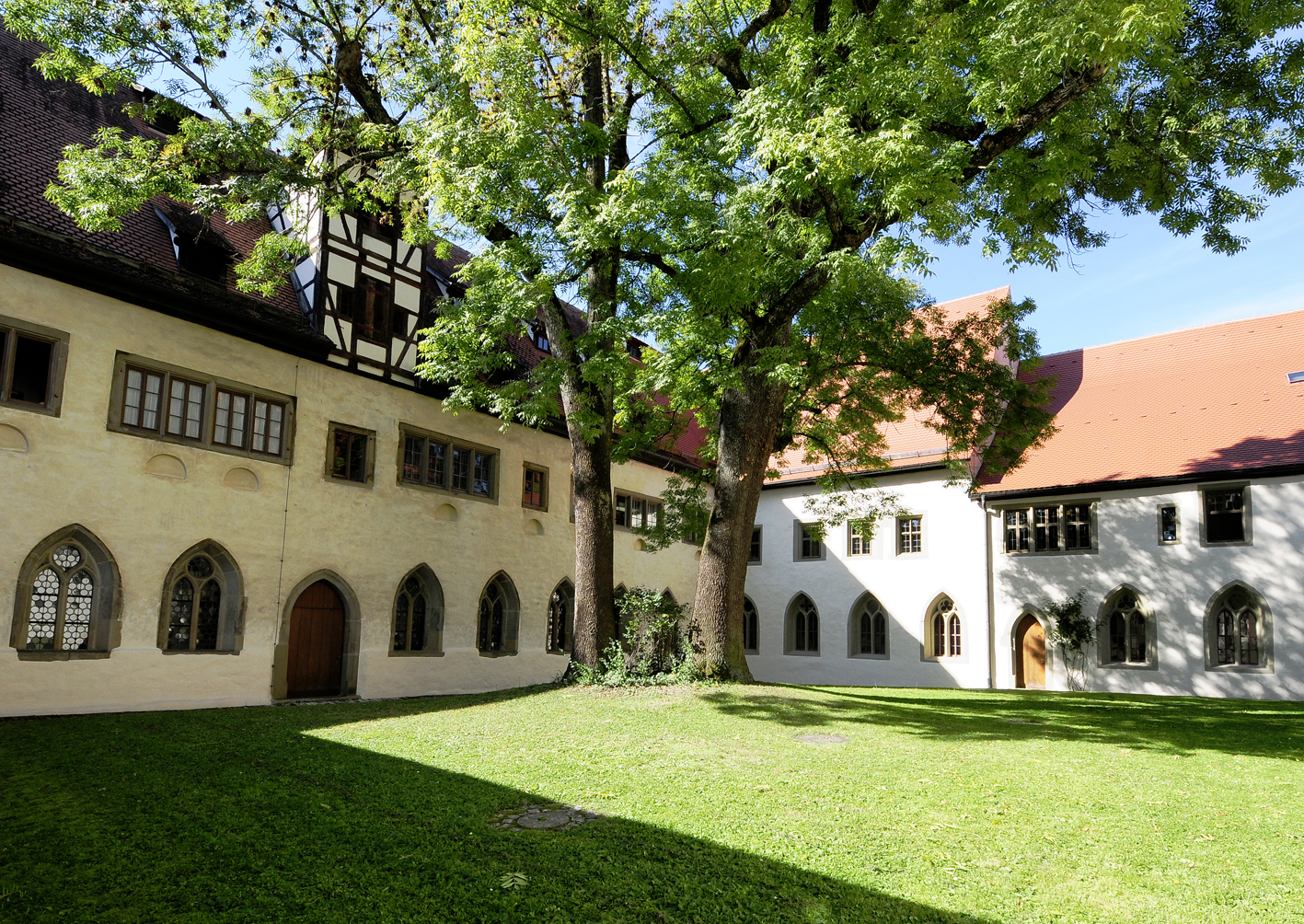 Kreuzhof und Kreuzgang des ehemaligen Dominikanerinnenklosters, heute RothenburgMuseum